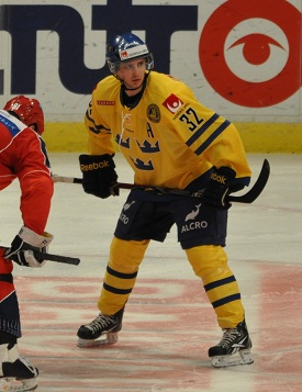 Marcus Krüger